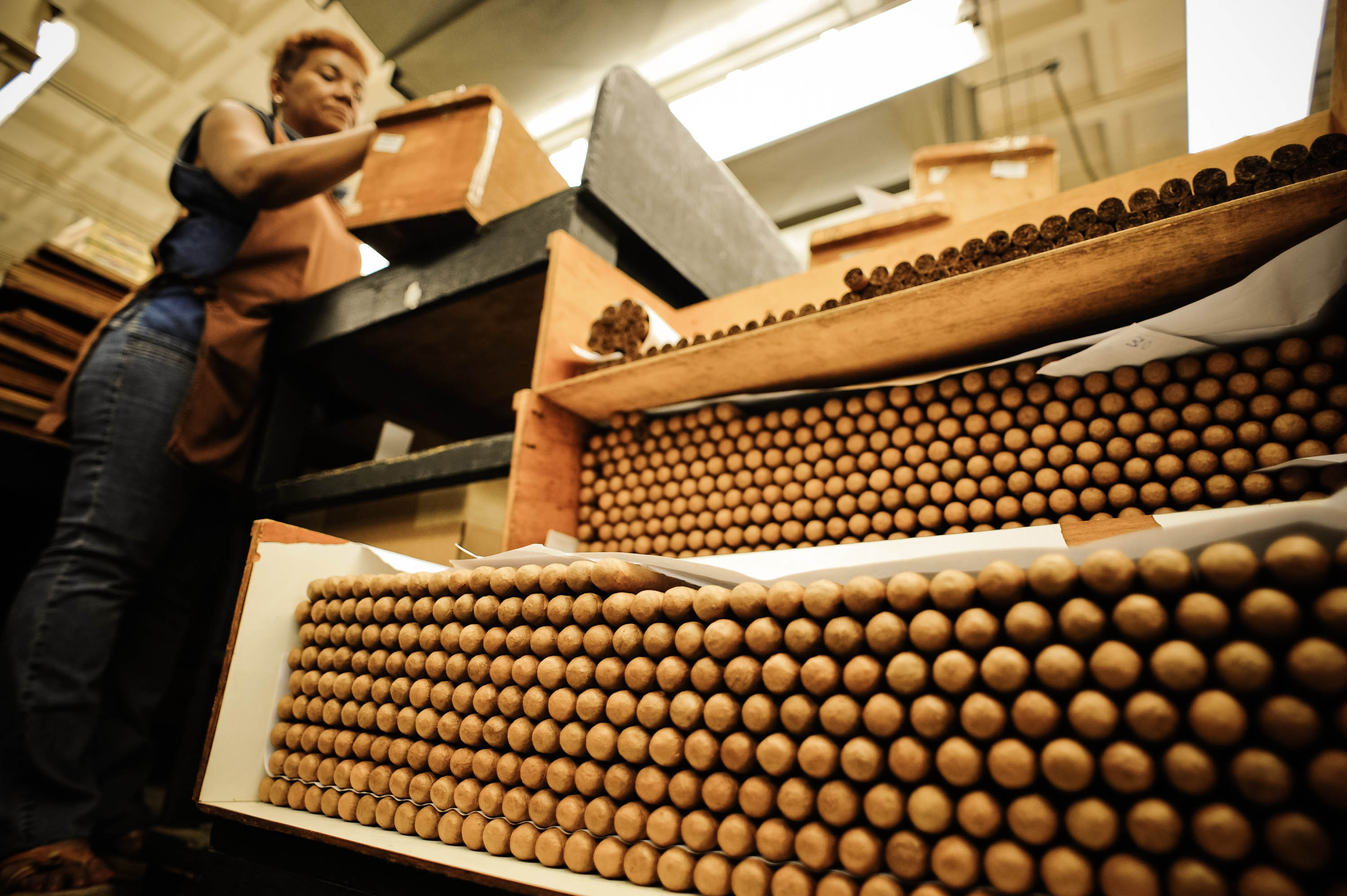 Keywords:Caribbean; Casa Del Campo; Cigar factory; Dominican Republic; La Romana; Домениканская республика; Карибские острова; Ла Романа; Фабрика Сигар Handmade cigar production, process. Tabacalera de Garcia Factory. Casa de Campo, La Romana, Dominican Republic.